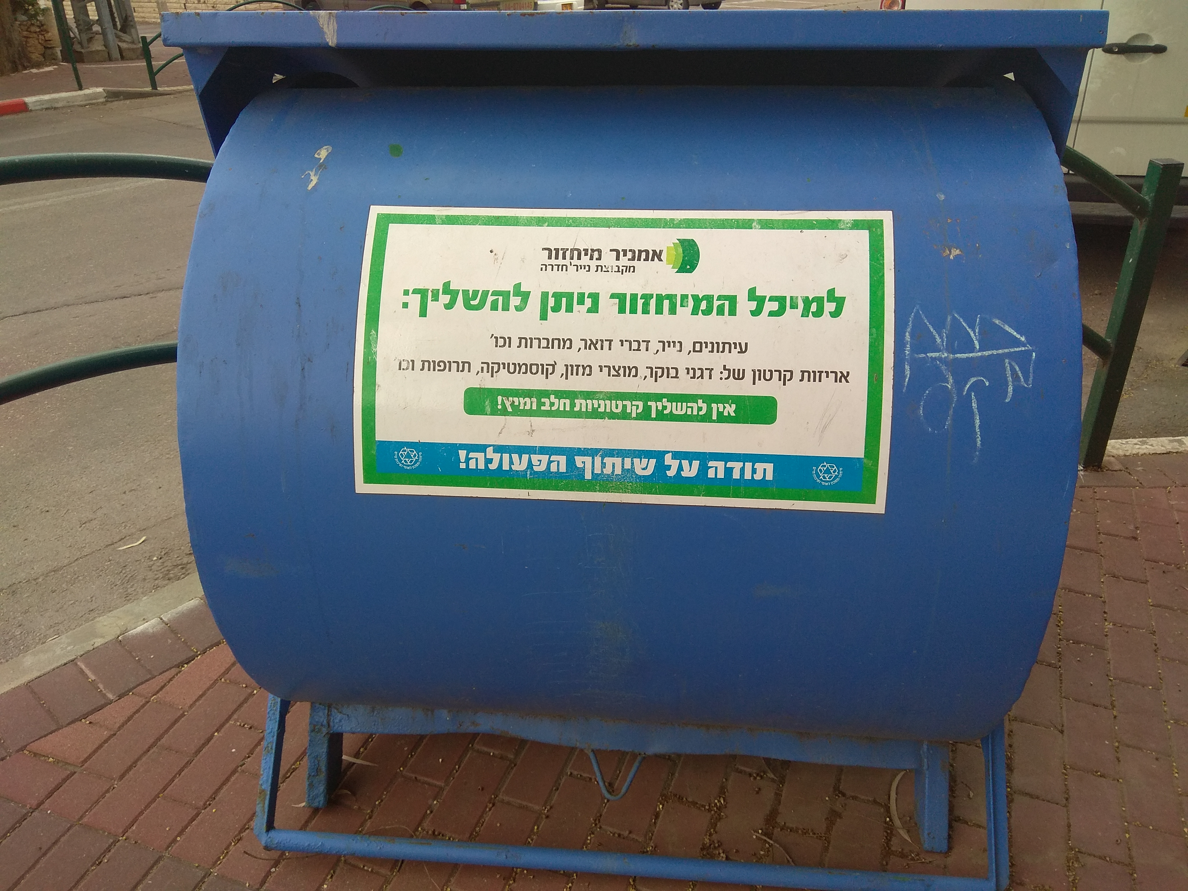 מתקן לאיסוף נייר של חברת אמניר